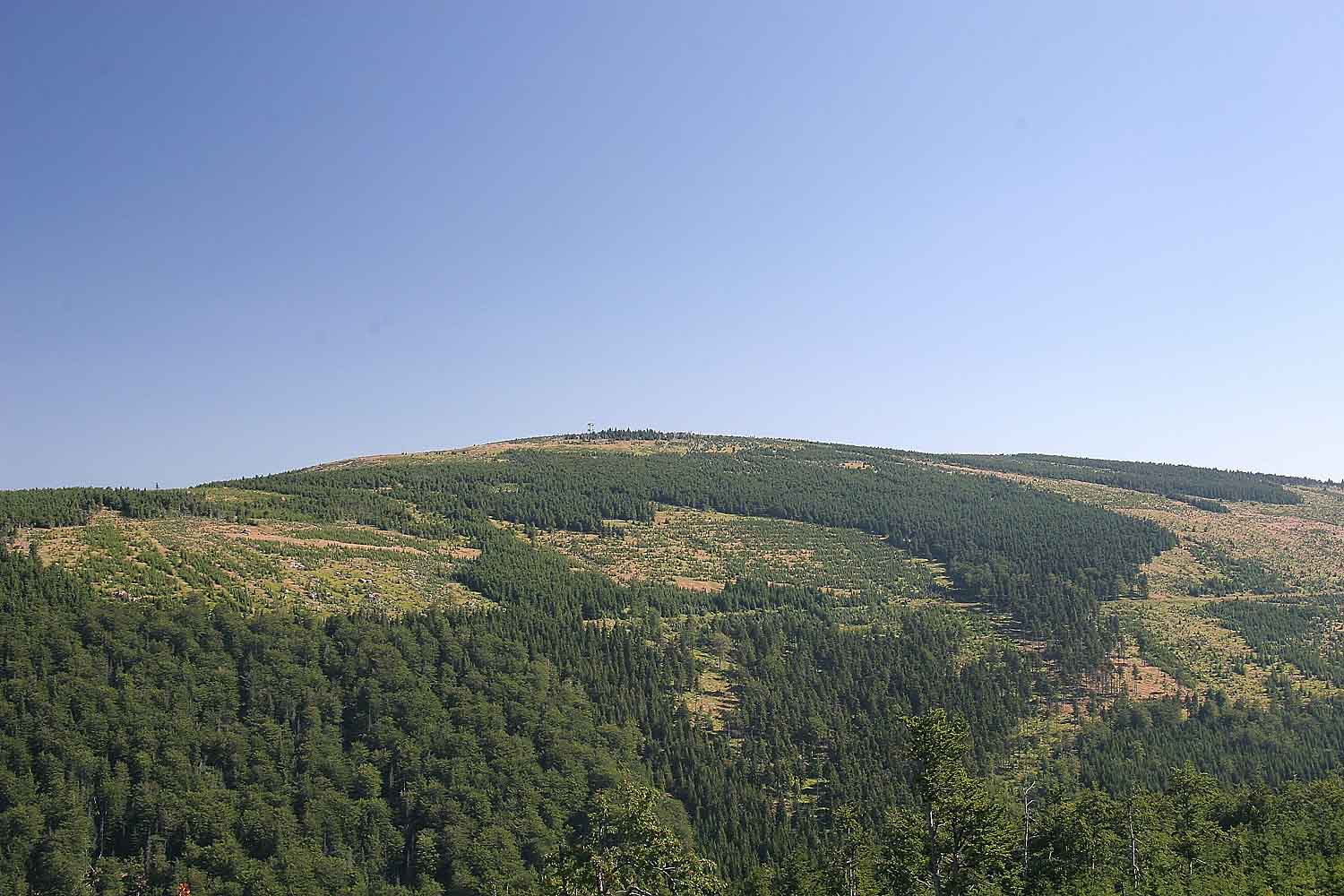 Jizerské hory - Smrk z Paličníku, Jizera Mountains, district Liberec, Czech Republic autor: Prazak date: 18. 7. 2006